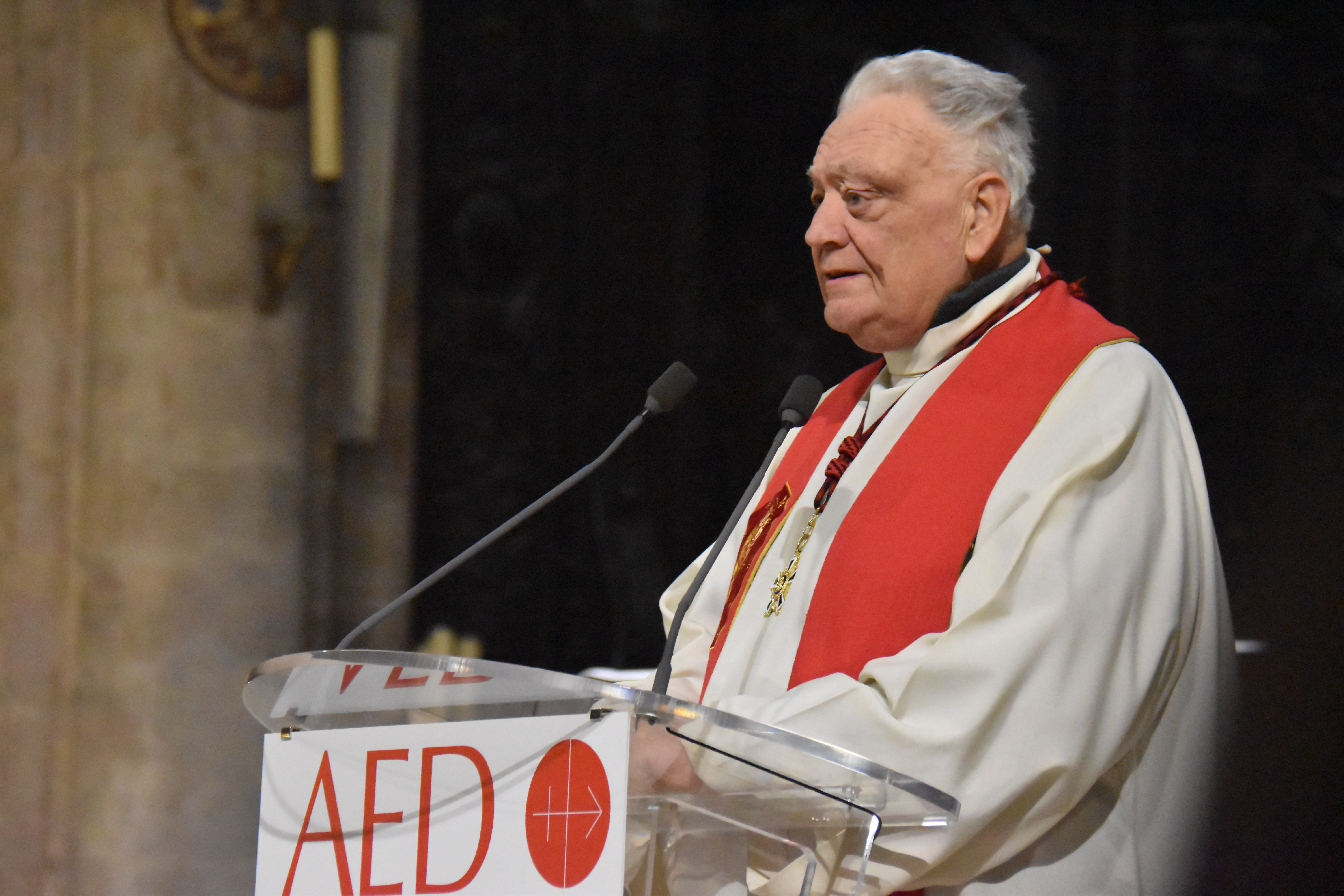 La 7e nuit des Témoins